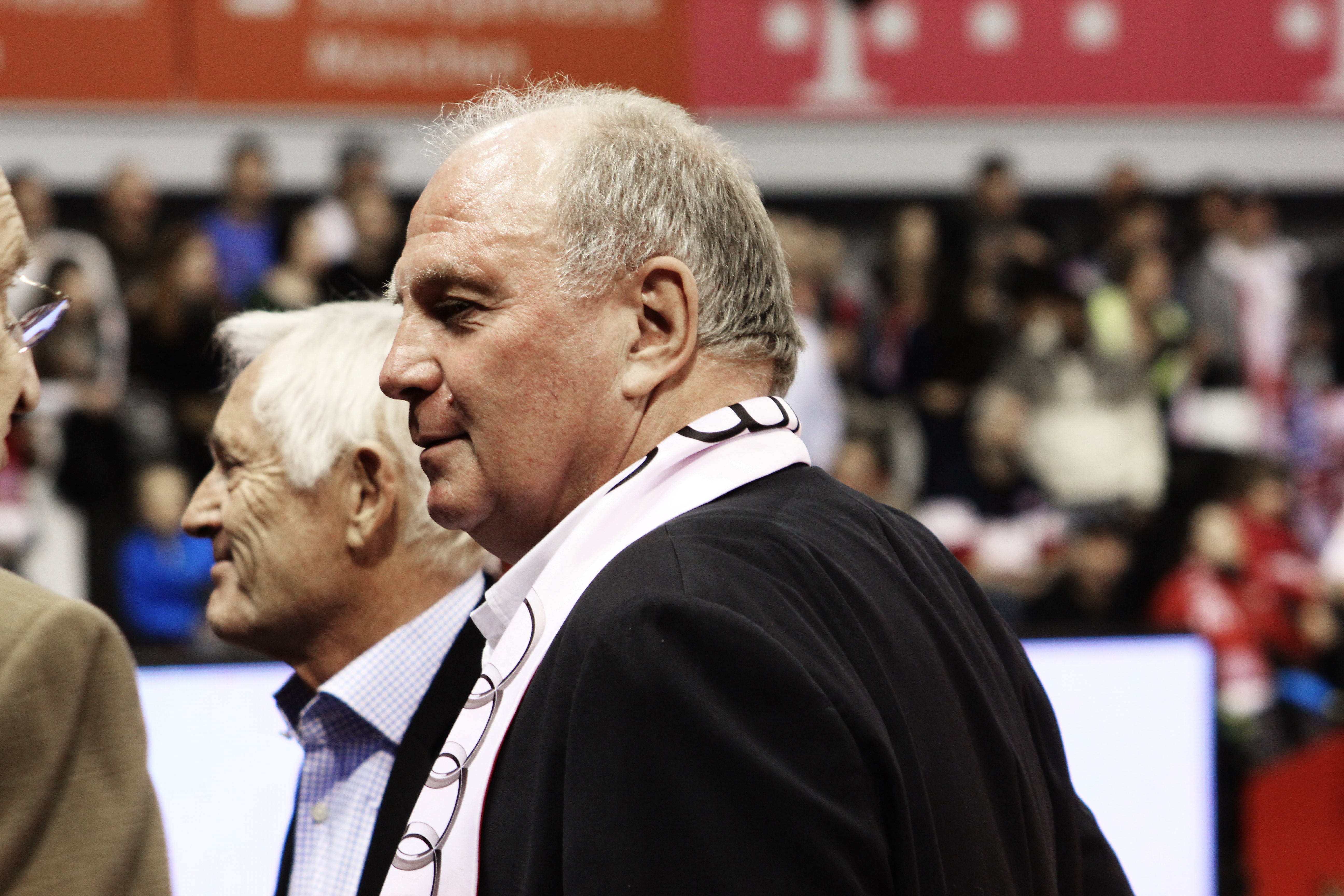 Uli Hoenes und Edmund Stoiber im Audidoom